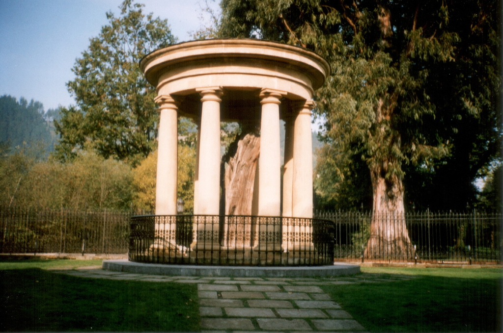 Templete con el tronco del Árbol de Guernica más viejo que se conserva.